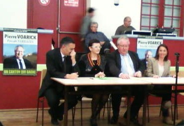 Réunion publique à Givry (71) de Pierre Voarick lors des élections cantonales 2011.